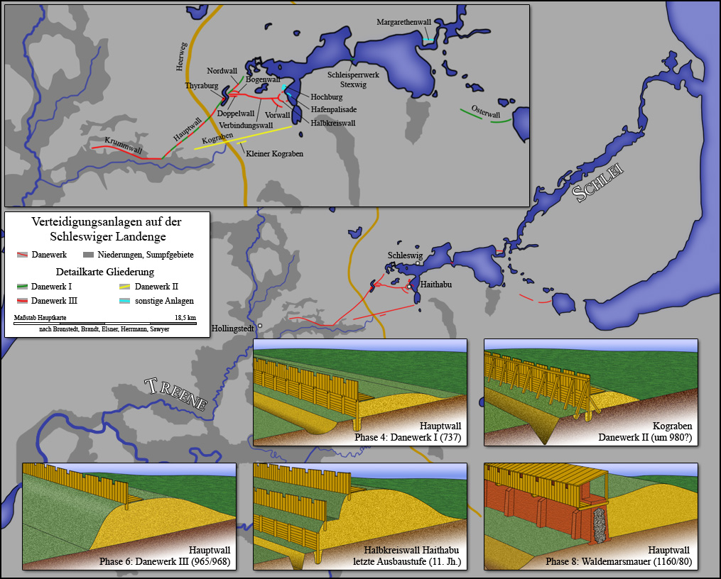 Verteidigungsanlagen auf der Schleswiger Landenge.